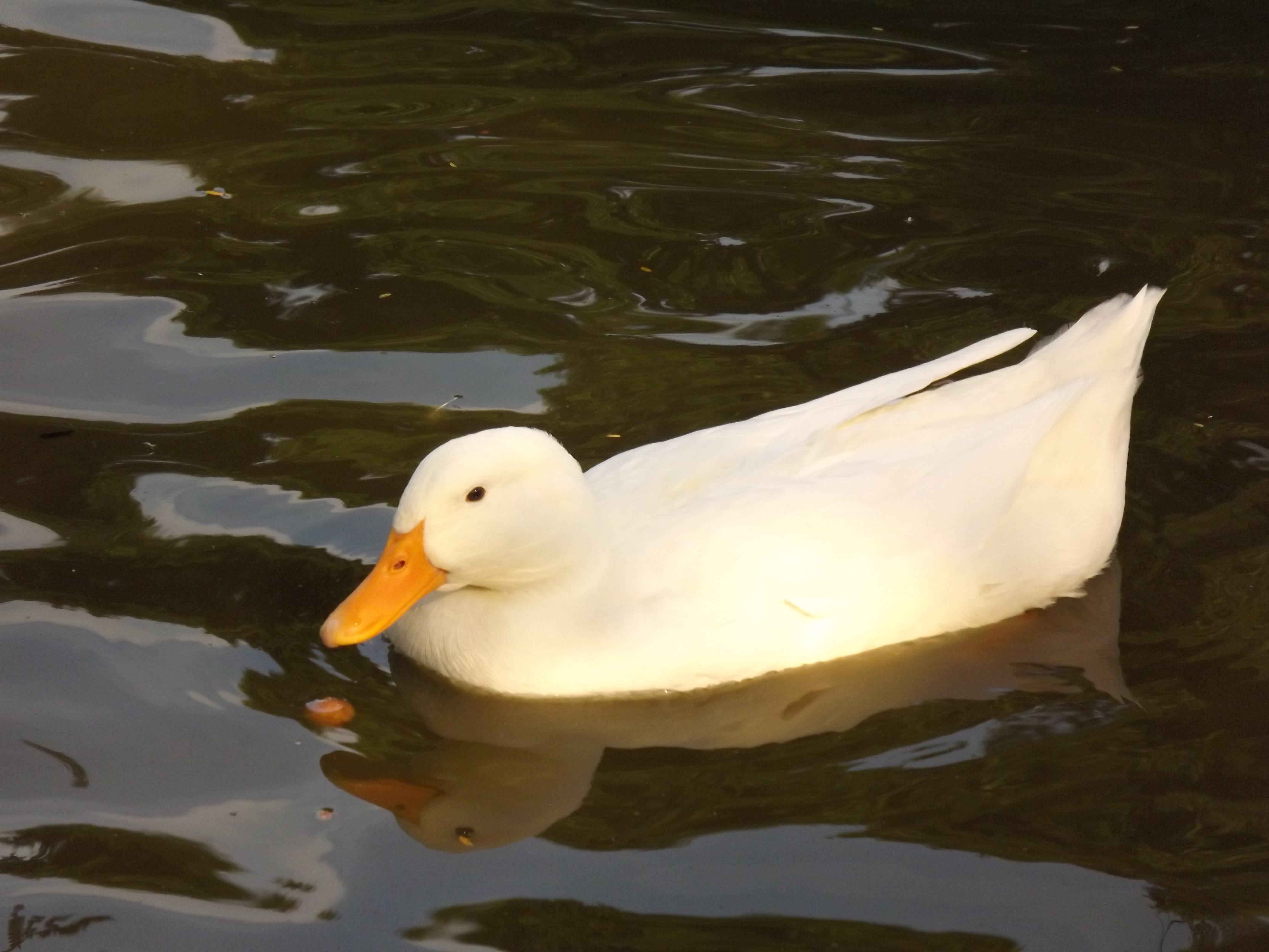 حديقة حيوان النزهة - الاسكندرية